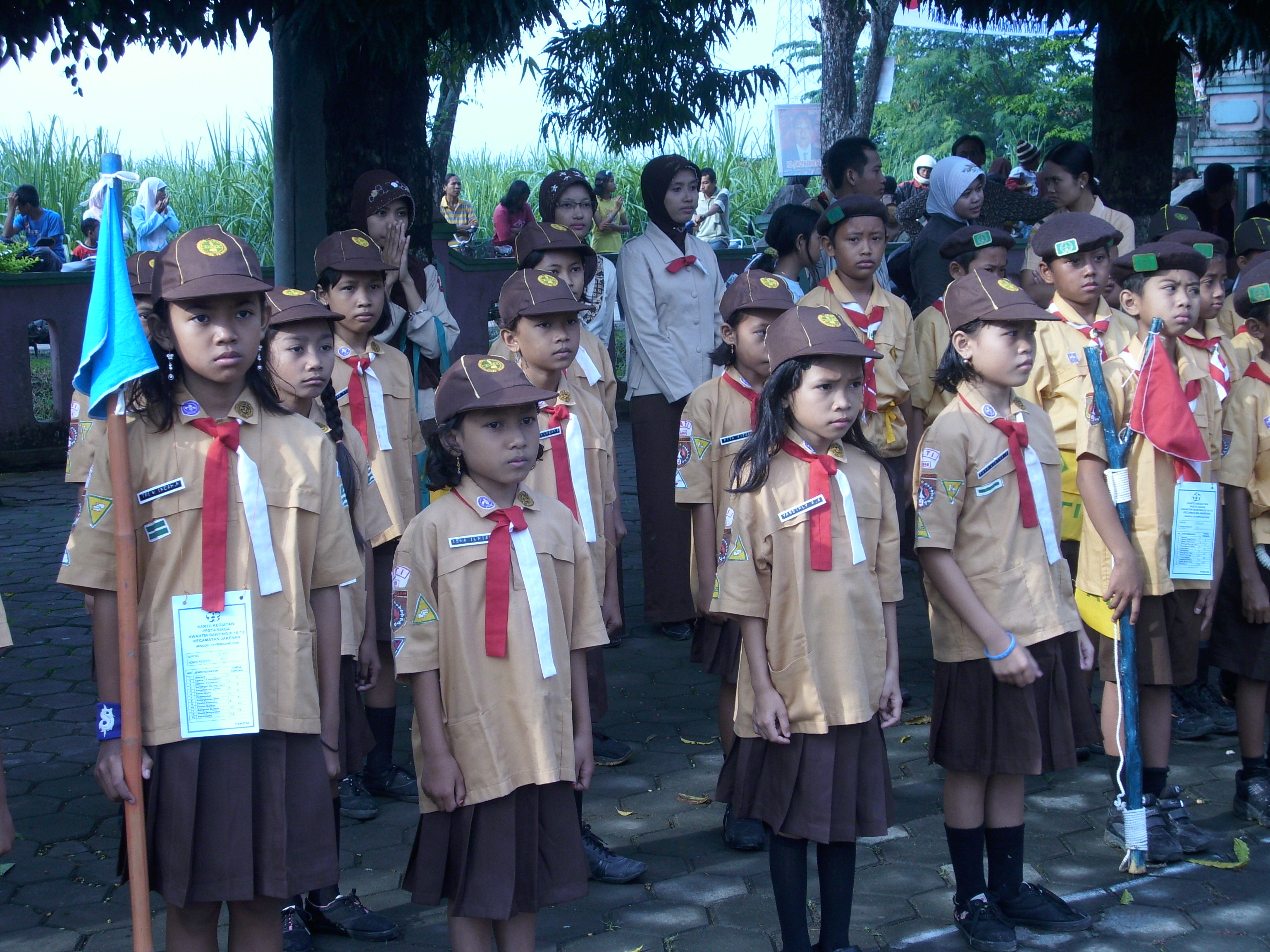 Foto Pramuka Siaga Putri di Kecamatan Jakenan, Kabupaten Pati, Provinsi Jawa Tengah, Indonesia